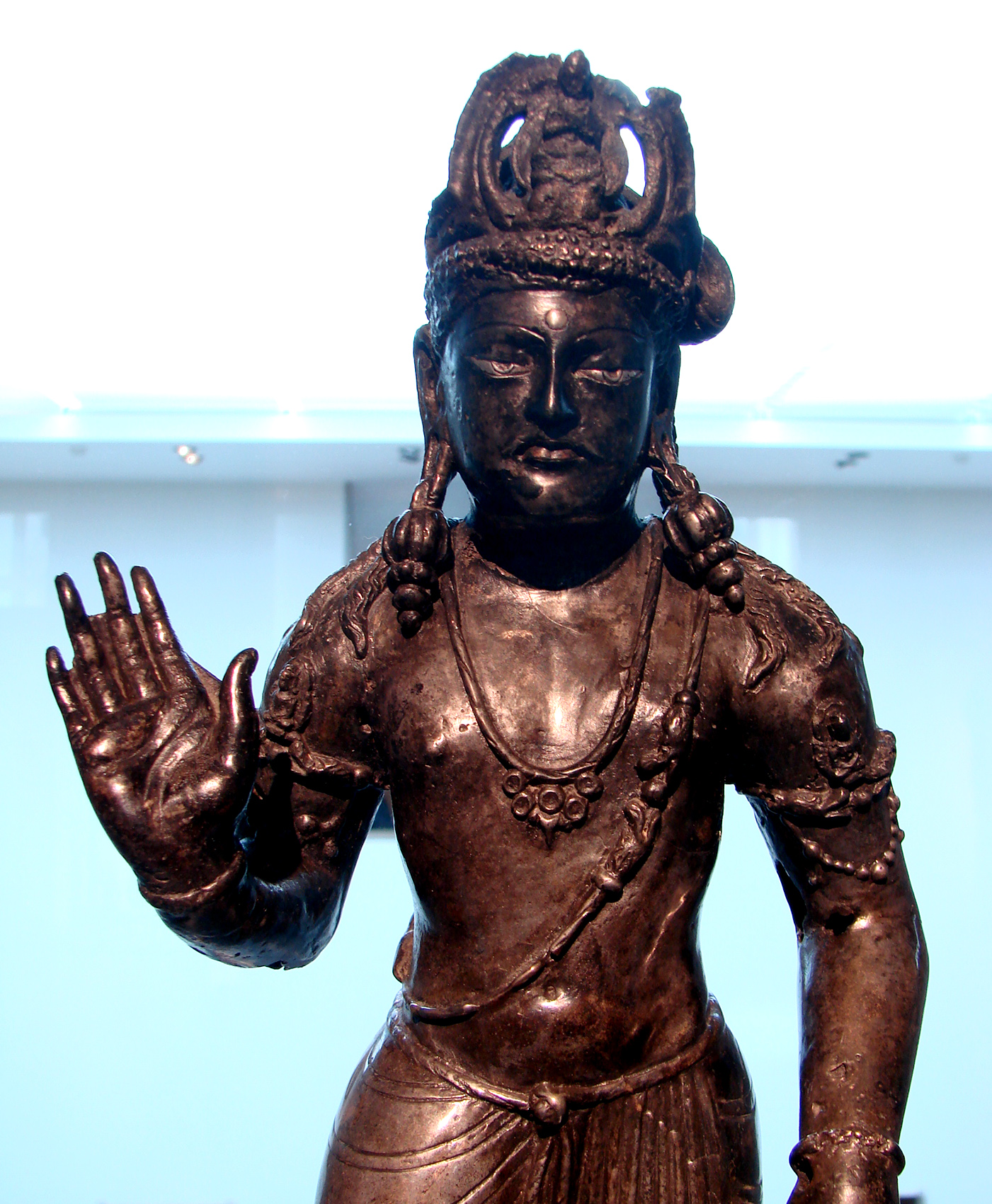 Le bodhisattva Avalokitesvara, Gandhara, 3ème siècle, bronze à forte teneur en étain. Musée Guimet, Paris.